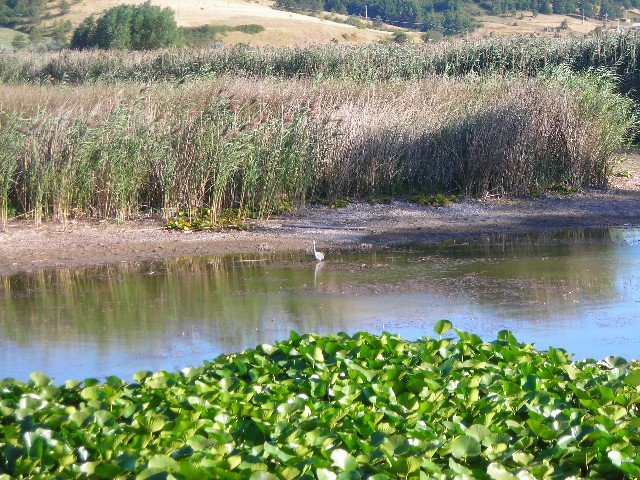 Laguna di Colfiorito, Foligno, Perugia, Umbria, Italy